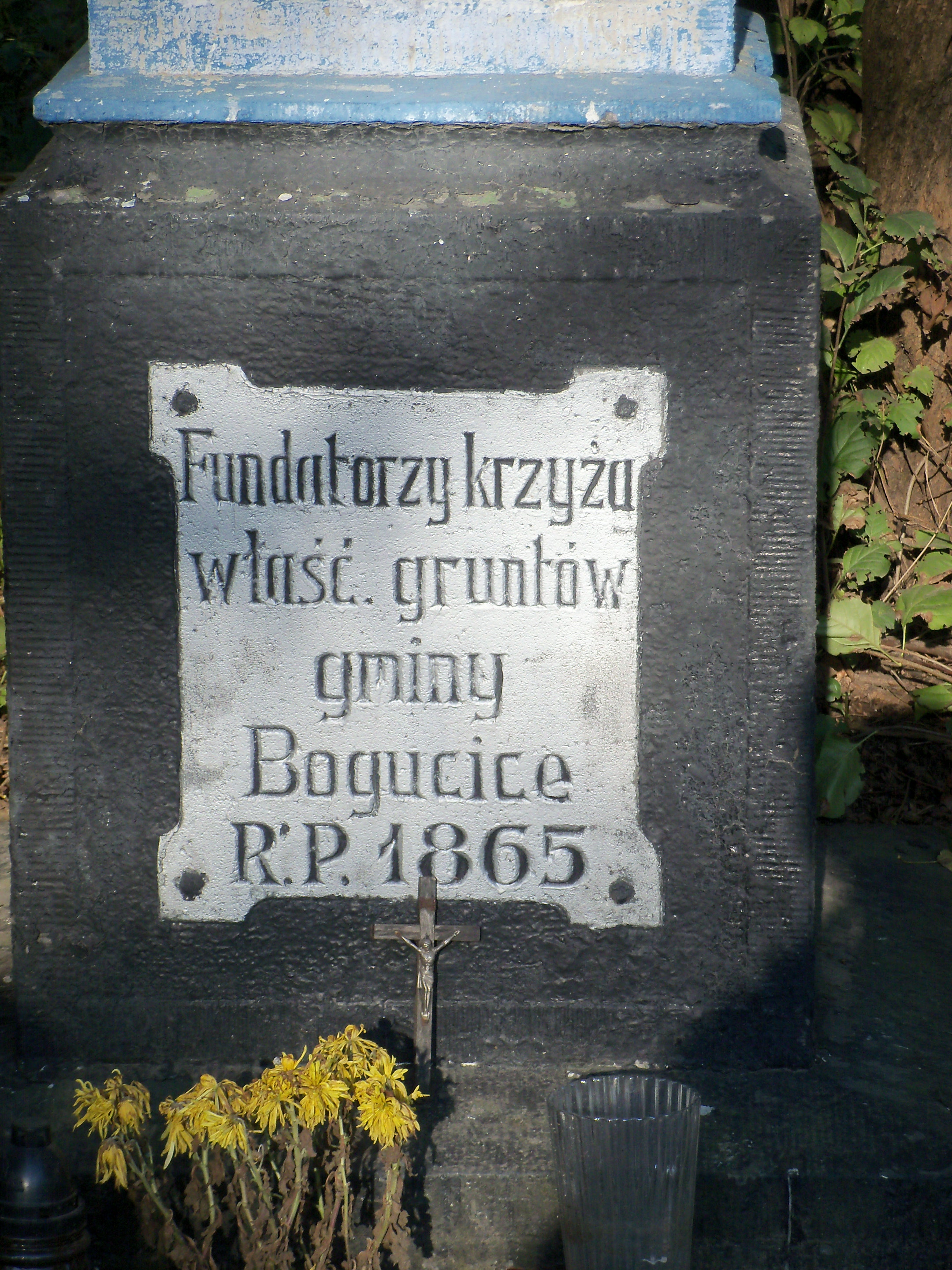 Krzyż z roku 1865 przy ul. W. Wróblewskiego w Katowicach-Bogucicach